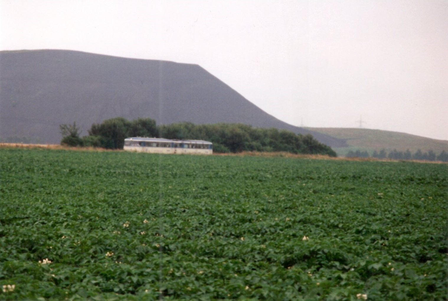 Eine Sonderfahrt der Interessengemeinschaft zur Bereisung stillgelegter Eisenbahnstrecken (IBSE) führte die Triebwagen des Eisenbahn-Amateur-Klub Jülich (EAKJ) 998 908-8 (links) und 798 670-6 (rechts) am 6. Juli 1997 unter Anderem auf die Strecke der Jülicher Kreisbahn (JKB) von Puffendorf nach Jülich, hier aufgenommen bei Ederen vor der Halde der 1992 stillgelegten Steinkohlen-Zeche Grube Emil Mayrisch (GEM) des Eschweiler Bergwerks-Vereins (EBV) in Siersdorf gegen 17.20 Uhr, also mit leichter Verspätung (Jülich sollte laut Plan um 17.30 erreicht werden).